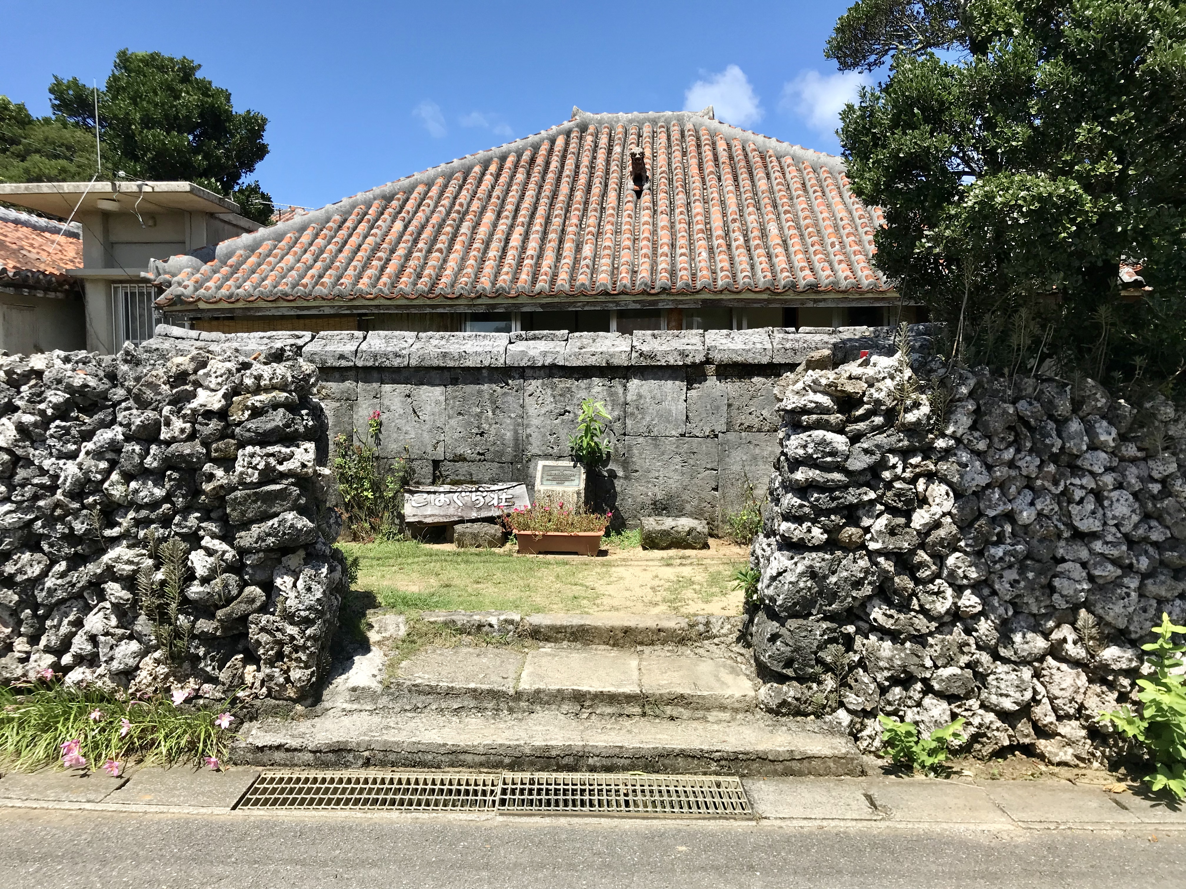 大盛家住宅（連続テレビ小説『ちゅらさん』のこはぐら荘ロケ地）